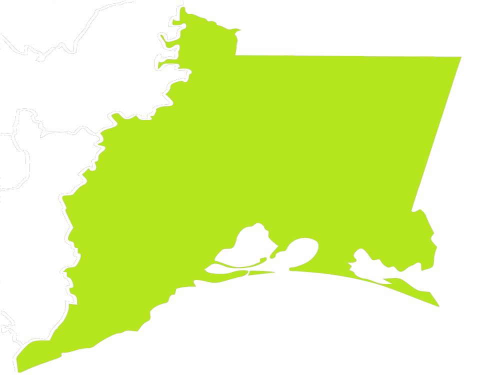 Región Istmo, una de las ocho regiones que conforman al estado mexicano de Oaxaca.